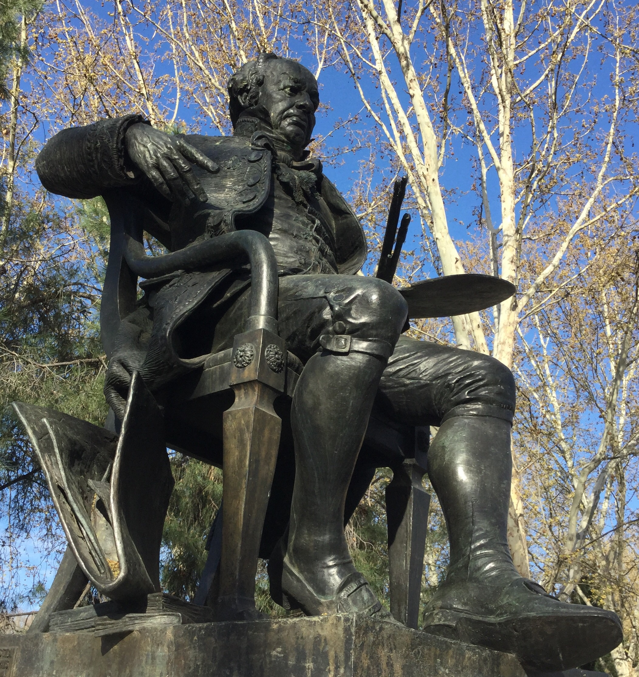 Escultura sedente de Goya, por José Llaneces. Madrid